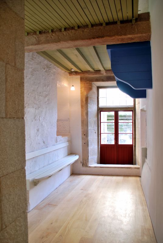 Interior de la Casa del Cabildo después de la intervención de restauración llevada a Cabo por el Consorcio de Santiago. Zona de comununicación entre el edificio de Raíña, 1 y la Casa del Cabildo en planta primera.